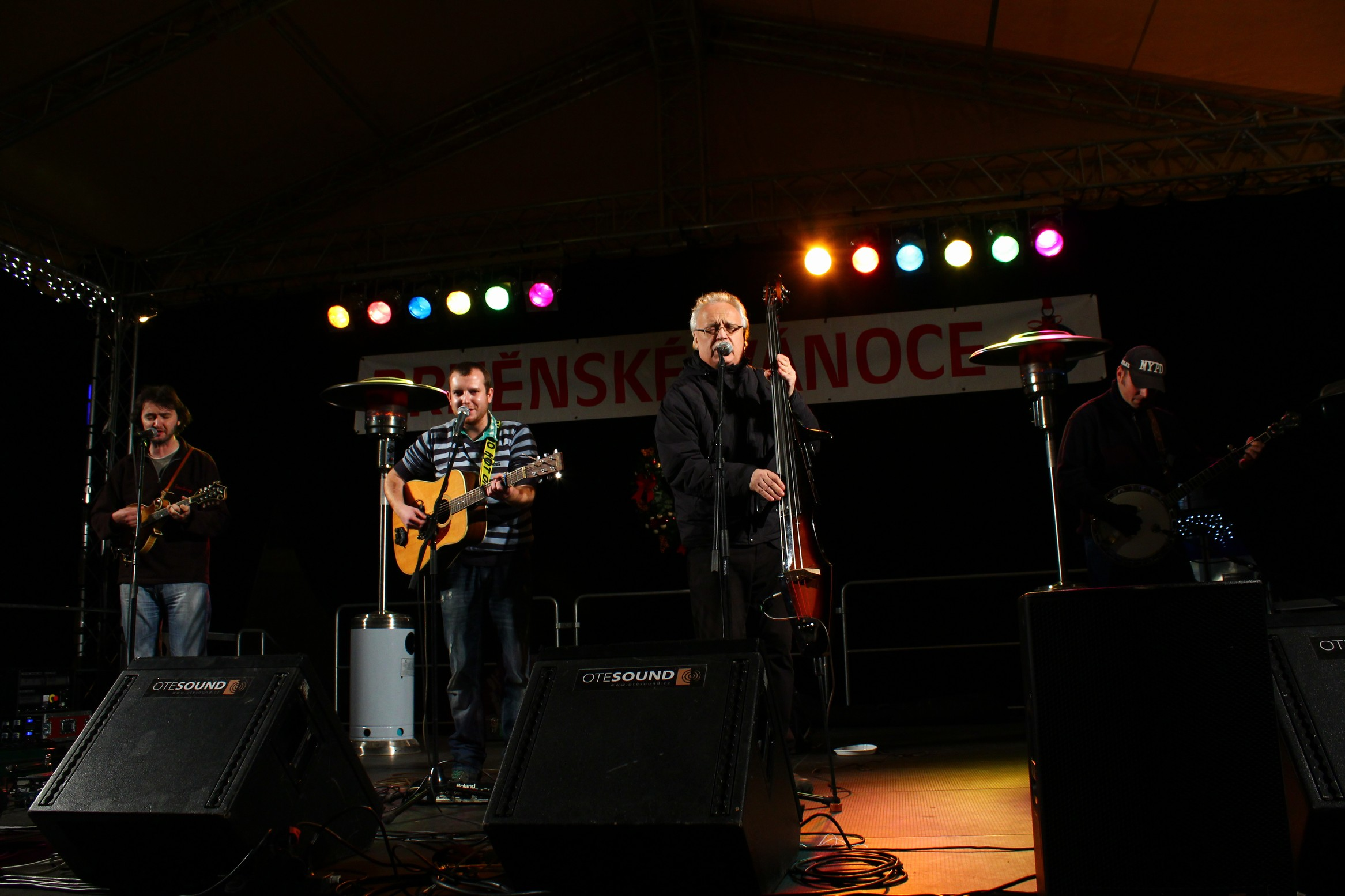 Poutníci 2011